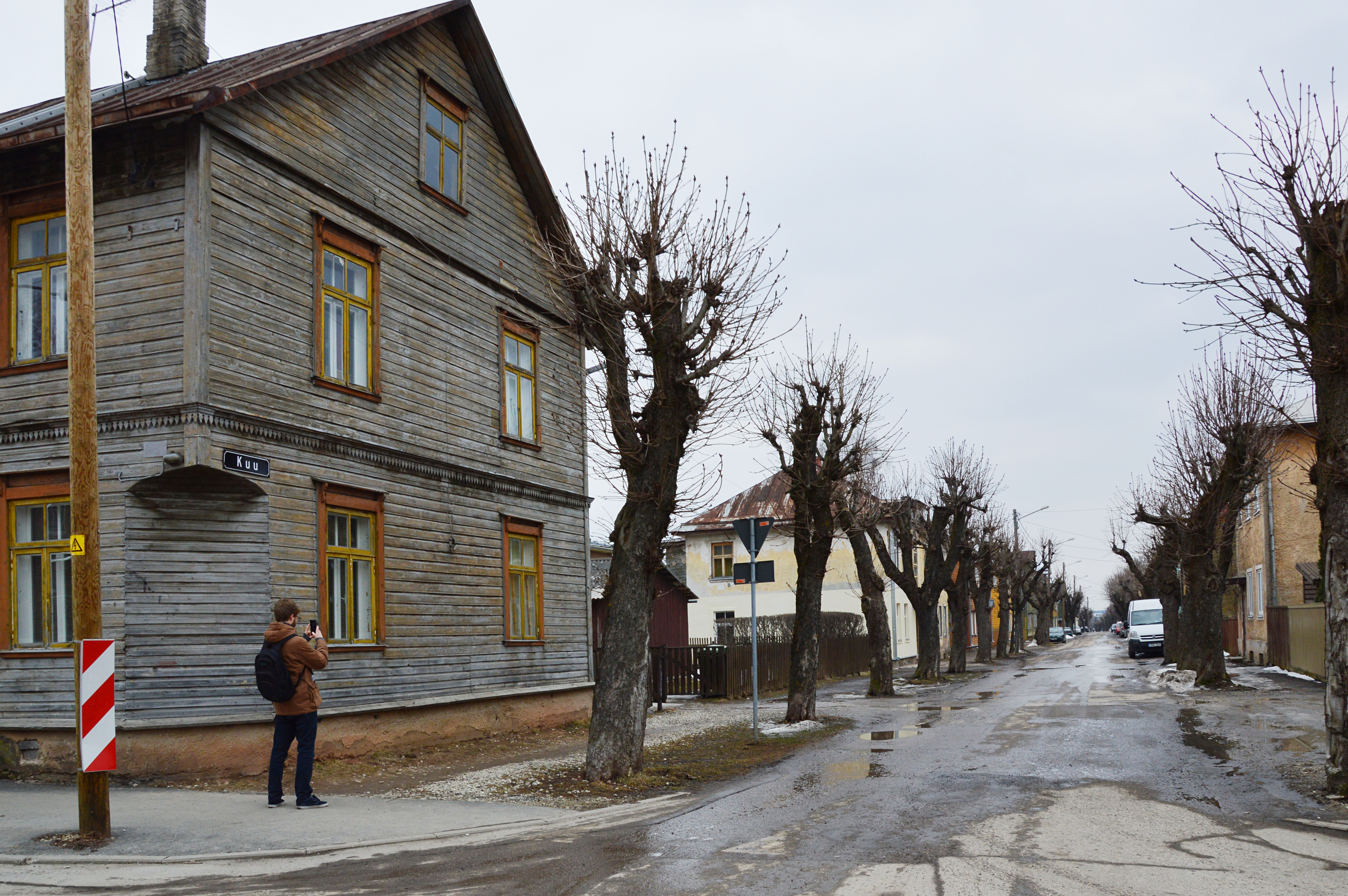 Kesk ja Kuu nurk, Tartu.